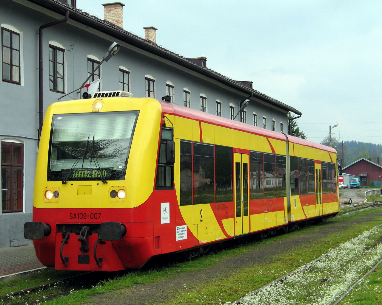 SA109-007 - czeka na odjazd ze stacji Zagórz jako osobówka do Jasła.